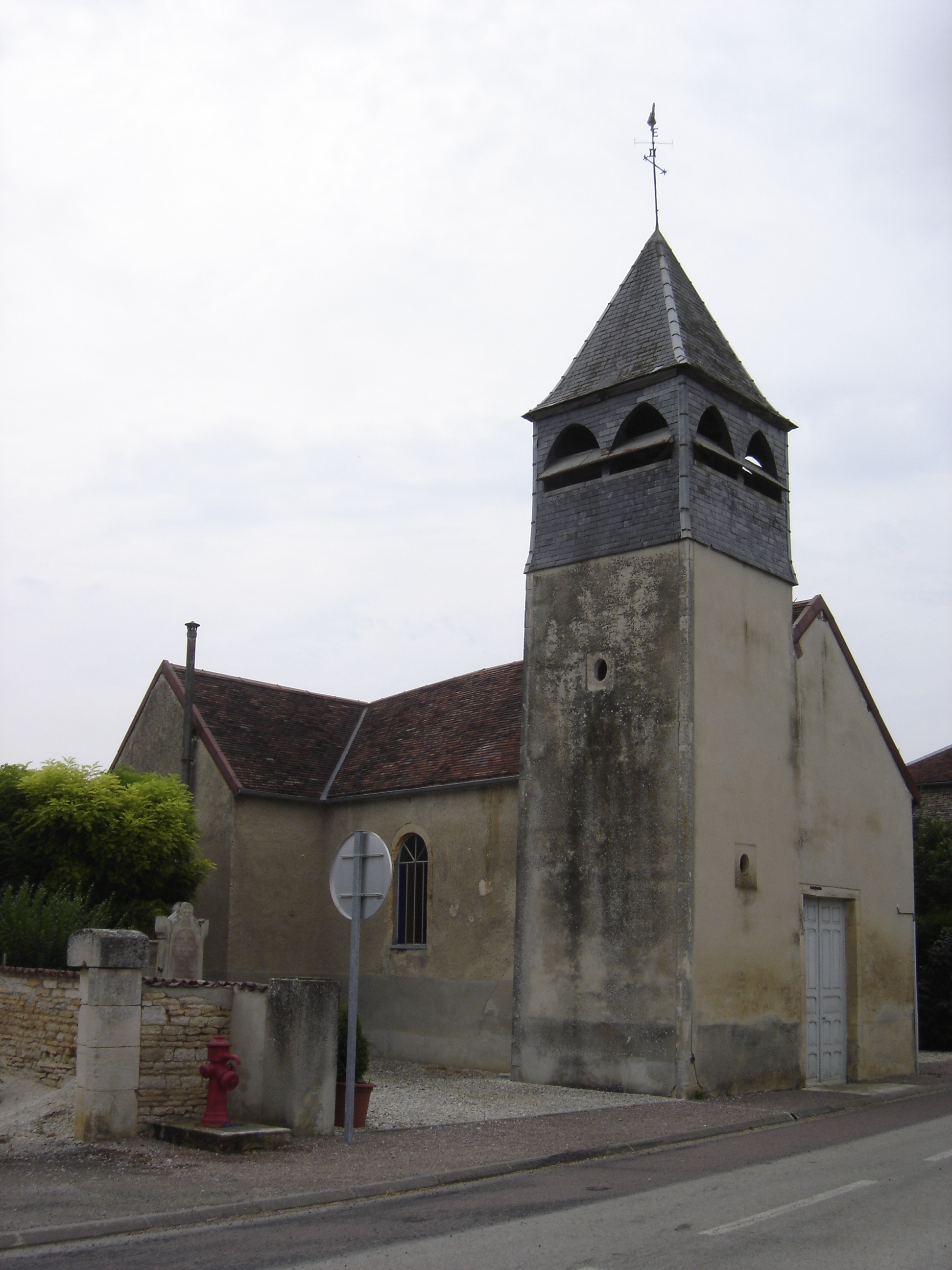 église de Montmartin-le-Haut - Aube - France